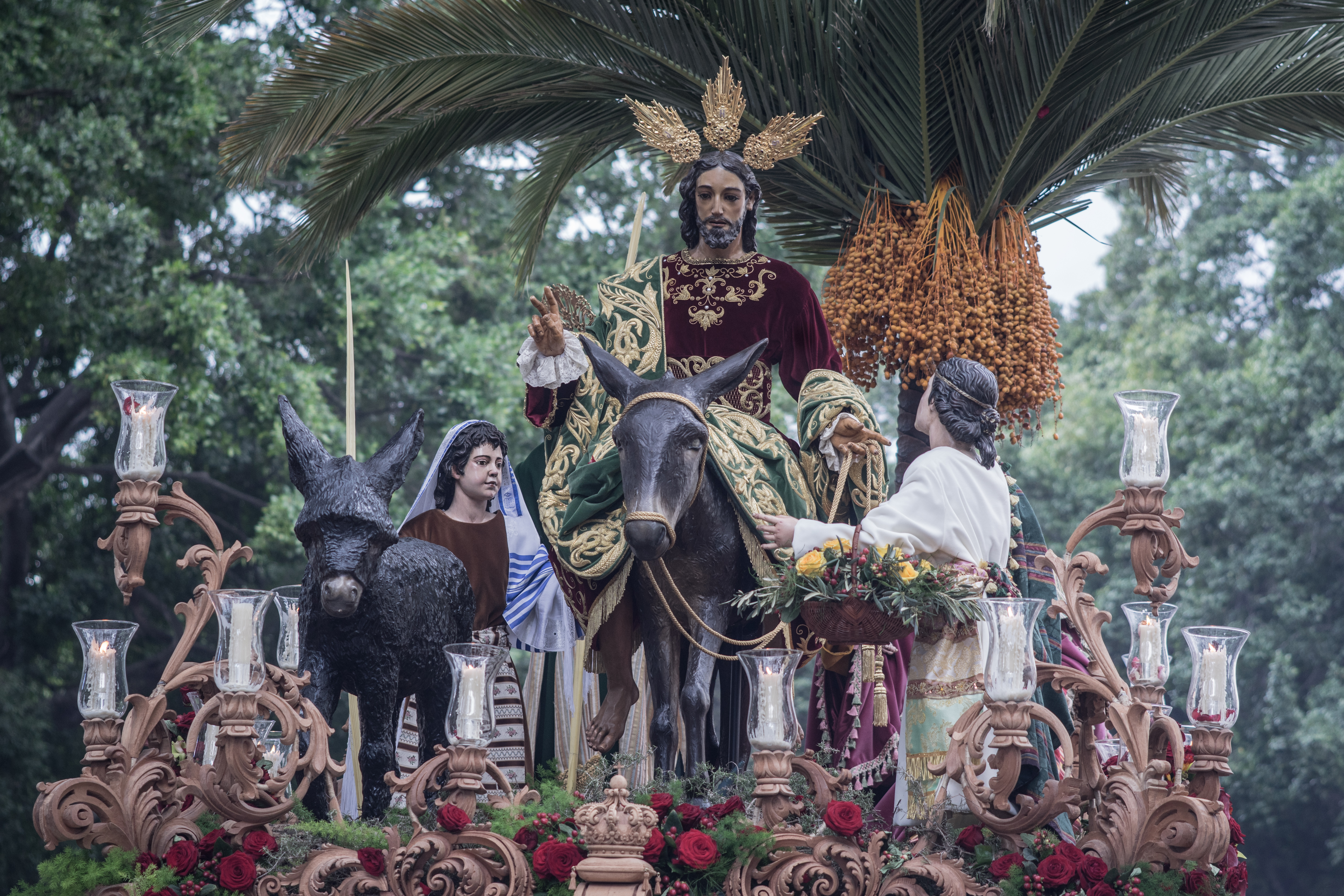 Trono de Nuestro Padre Jesús de la Real Cofradía de Nuestro Padre Jesús a su Entrada en Jerusalén y María Santísima del Amparo This is a photography of a Folklore festival in Spain (Wikidata id Q9075883).